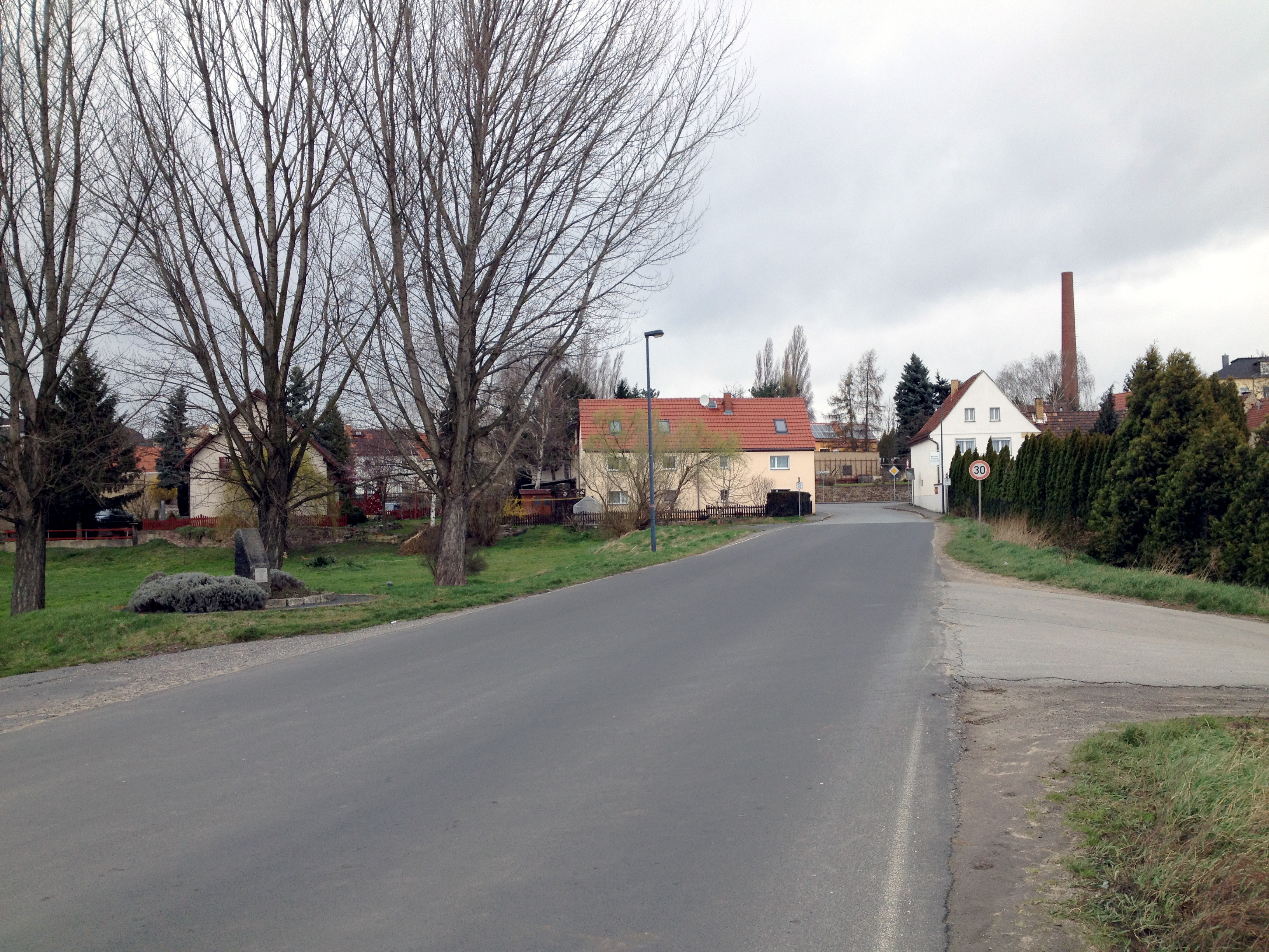 Radebeul (Gemarkung), Kaditzer Straße (Radebeul) nach Norden, links der Heinkehrerstein